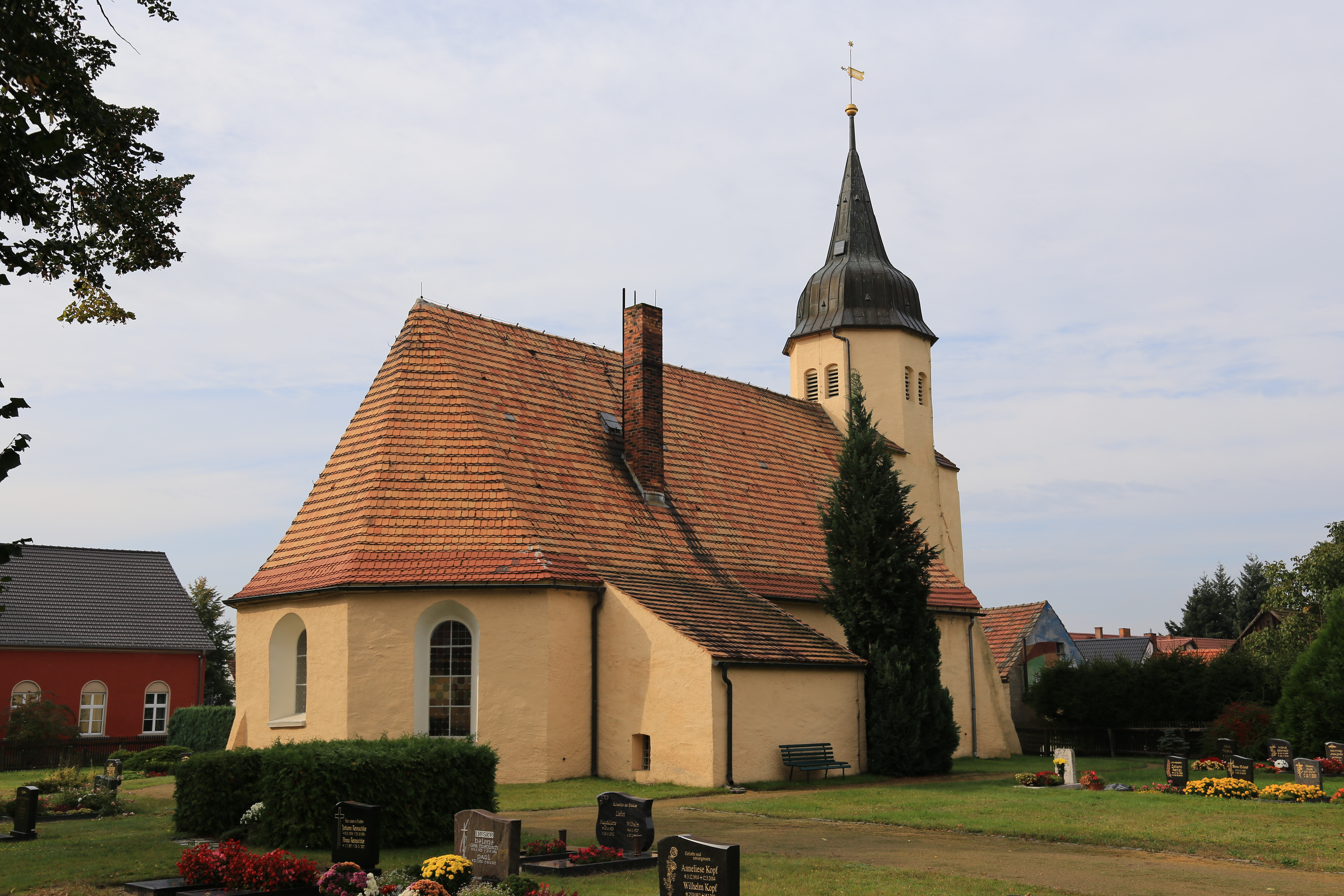 Kirche Geierswalde September 2017 (4)